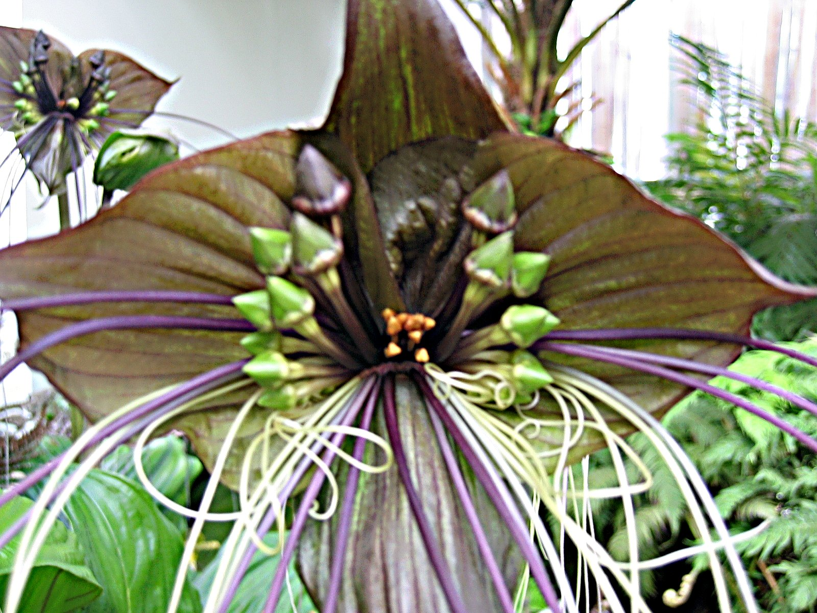 batflower, photographed in Berlin-Marzahn Wann kann man die Fledermausblume umpflanzen?